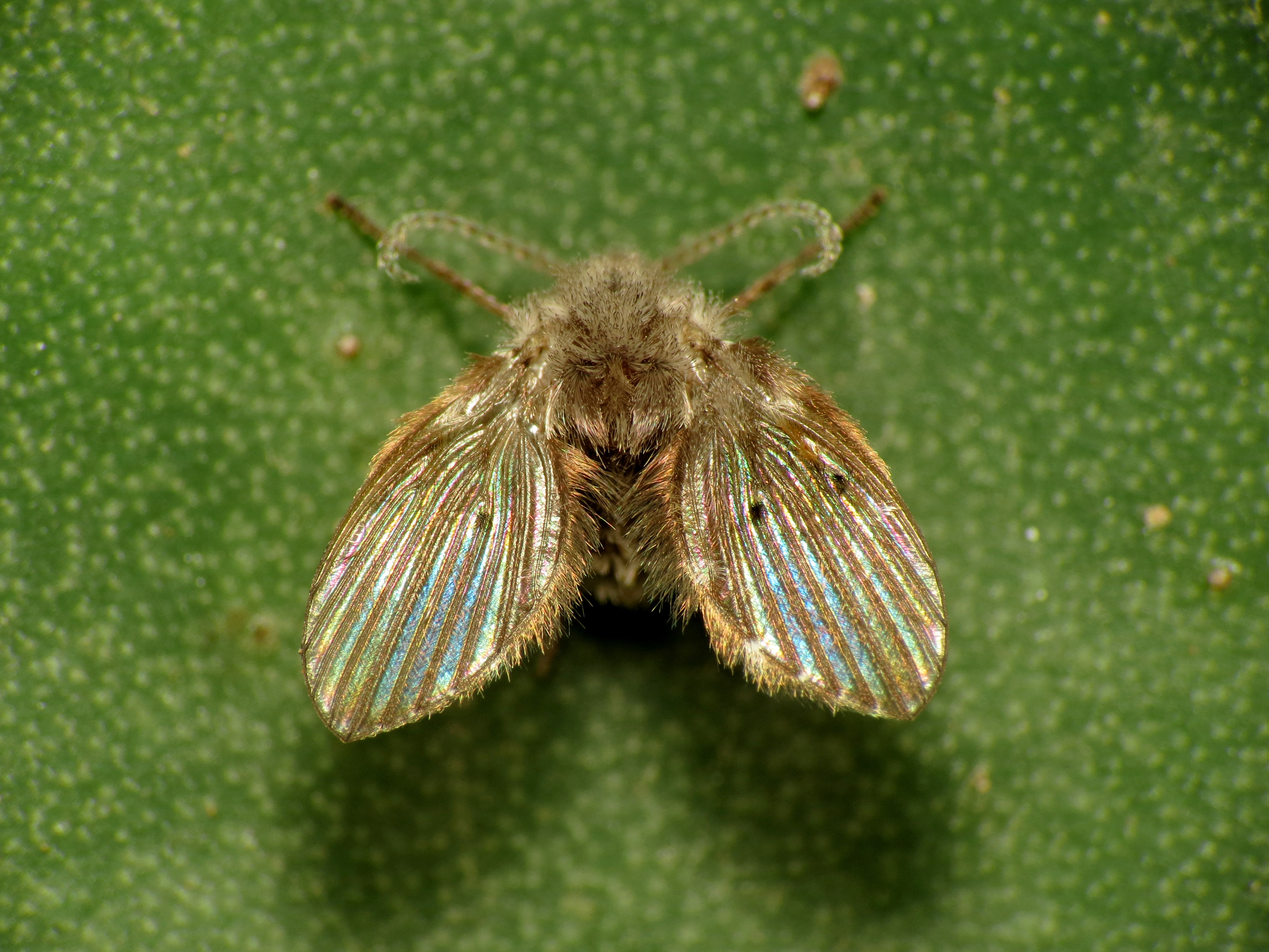 Clogmia albipunctata. Els Poblets, Alicante, Spain